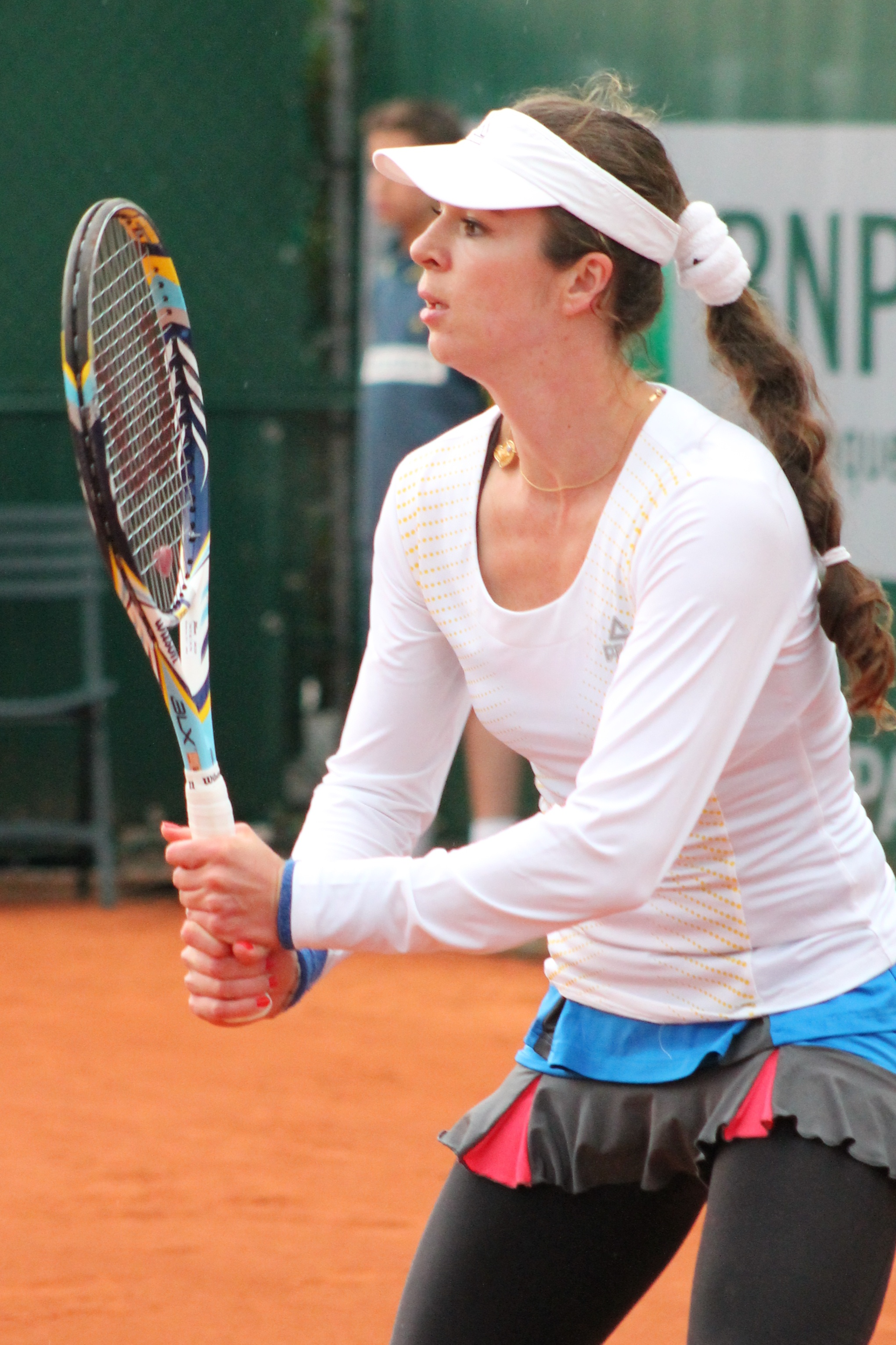 Voskoboeva RG13 (22)